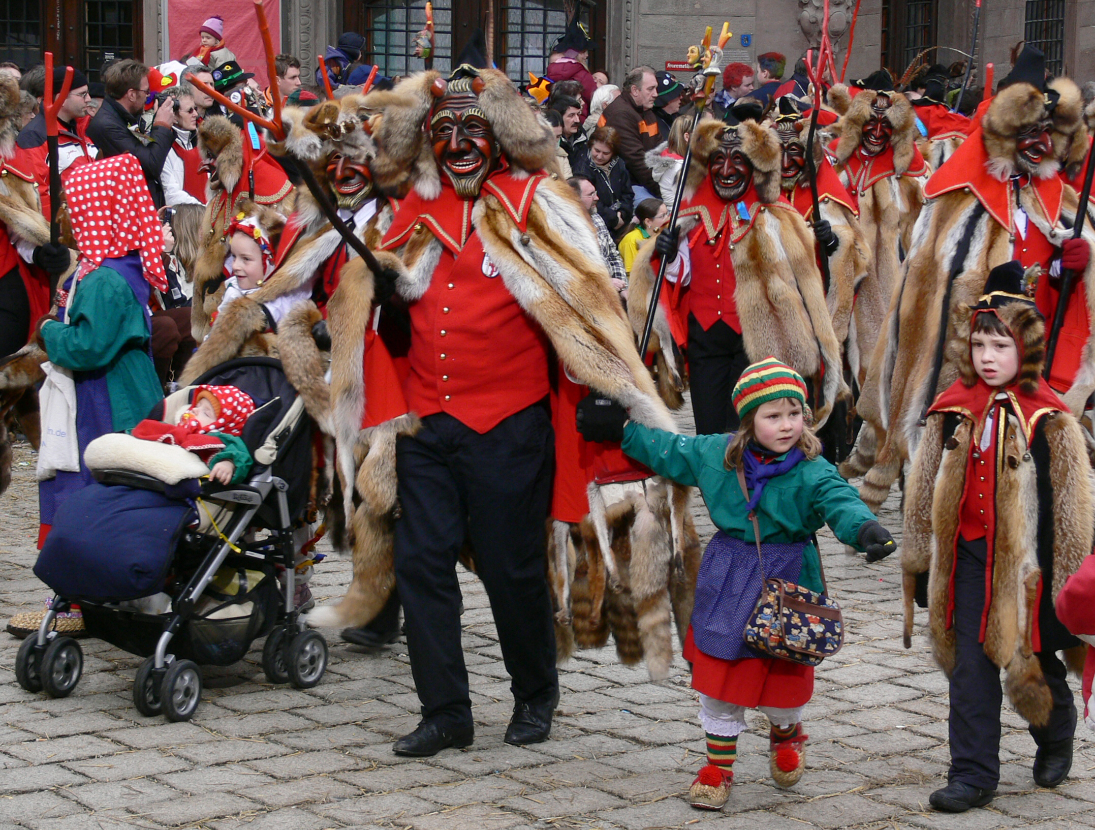 Dorauszunft Saulgau, Figur: Pelzteufel; beim Narrensprung beim Narrentreffen Meßkirch 2006